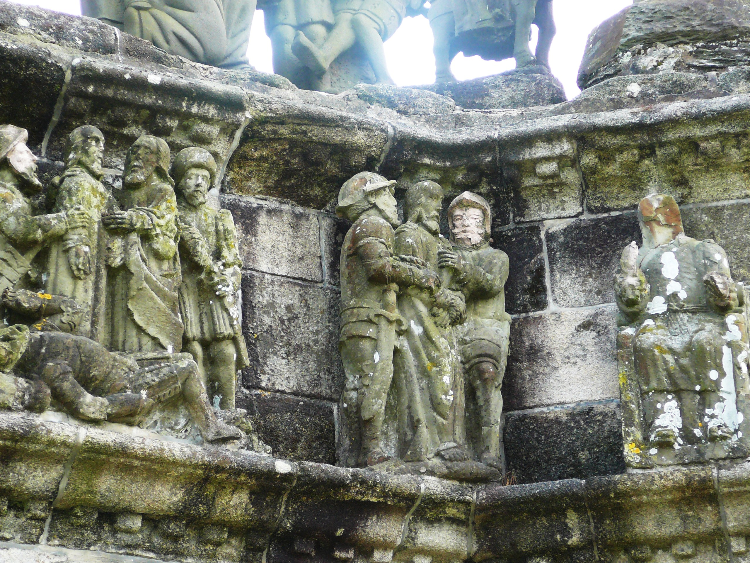 Pleyben: le calvaire, détail vue 1